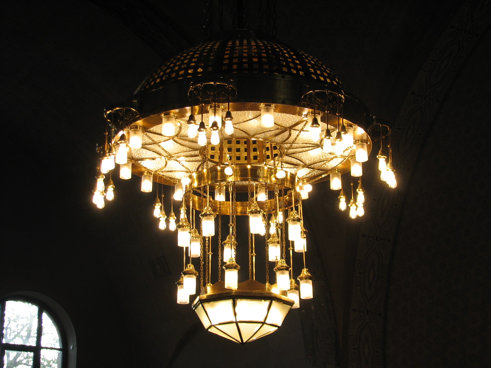 Kronleuchter, Detail